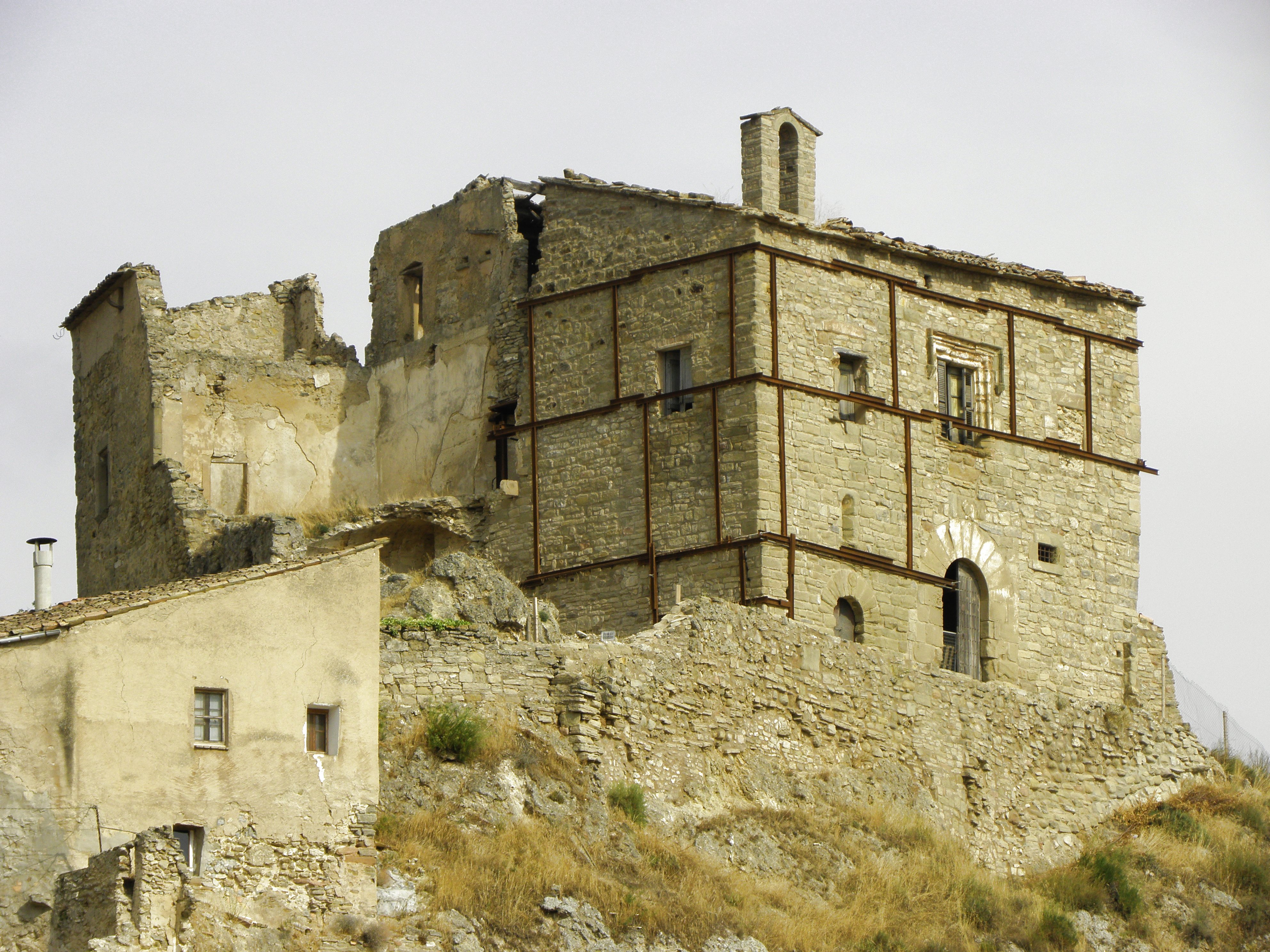 El castell d'Enfesta (municipi de la Molsosa, Solsonès)